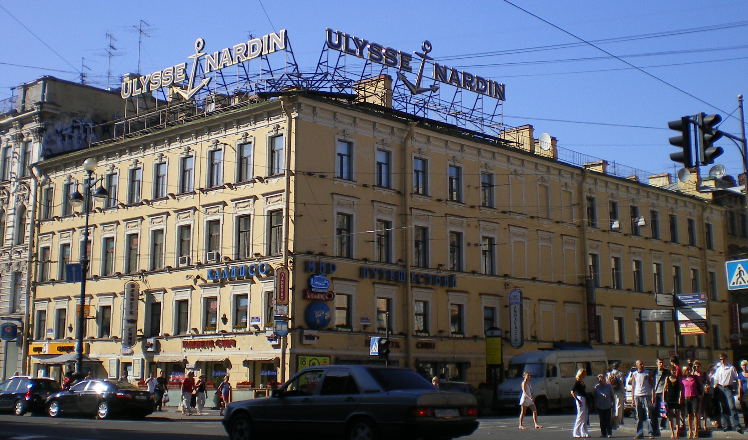 Невский проспект 94